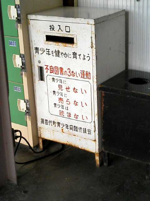 猪苗代町青少年問題協議会が会津バスの待合所に設置した白ポスト。